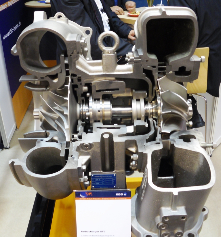 Schnitt durch einen Hilfsdiesel-Abgasturbolader von der Fa. Kompressorenbau Bannewitz